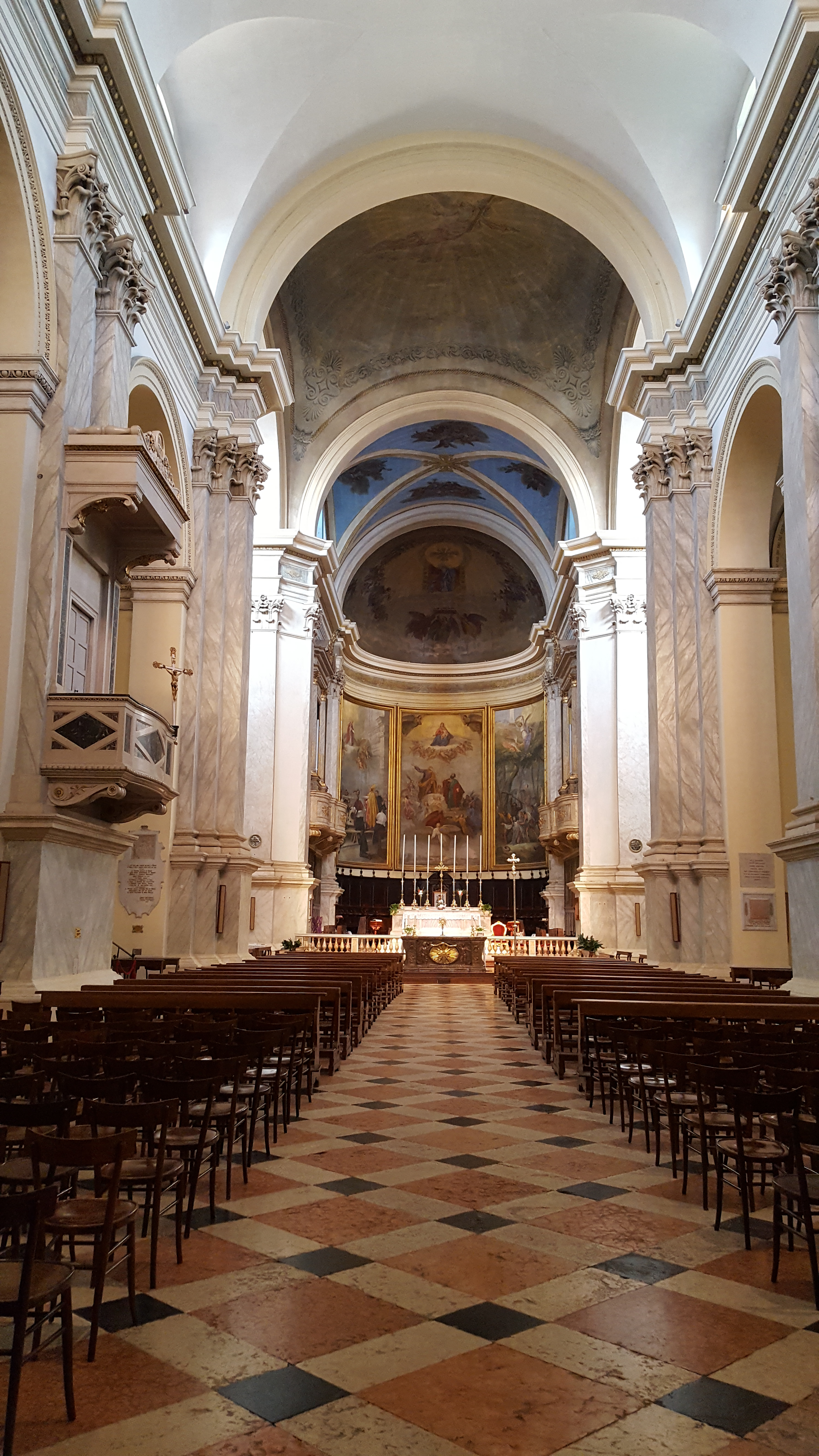 Presbiterio racchiuso tra la balaustrata in marmo rosso di Verona